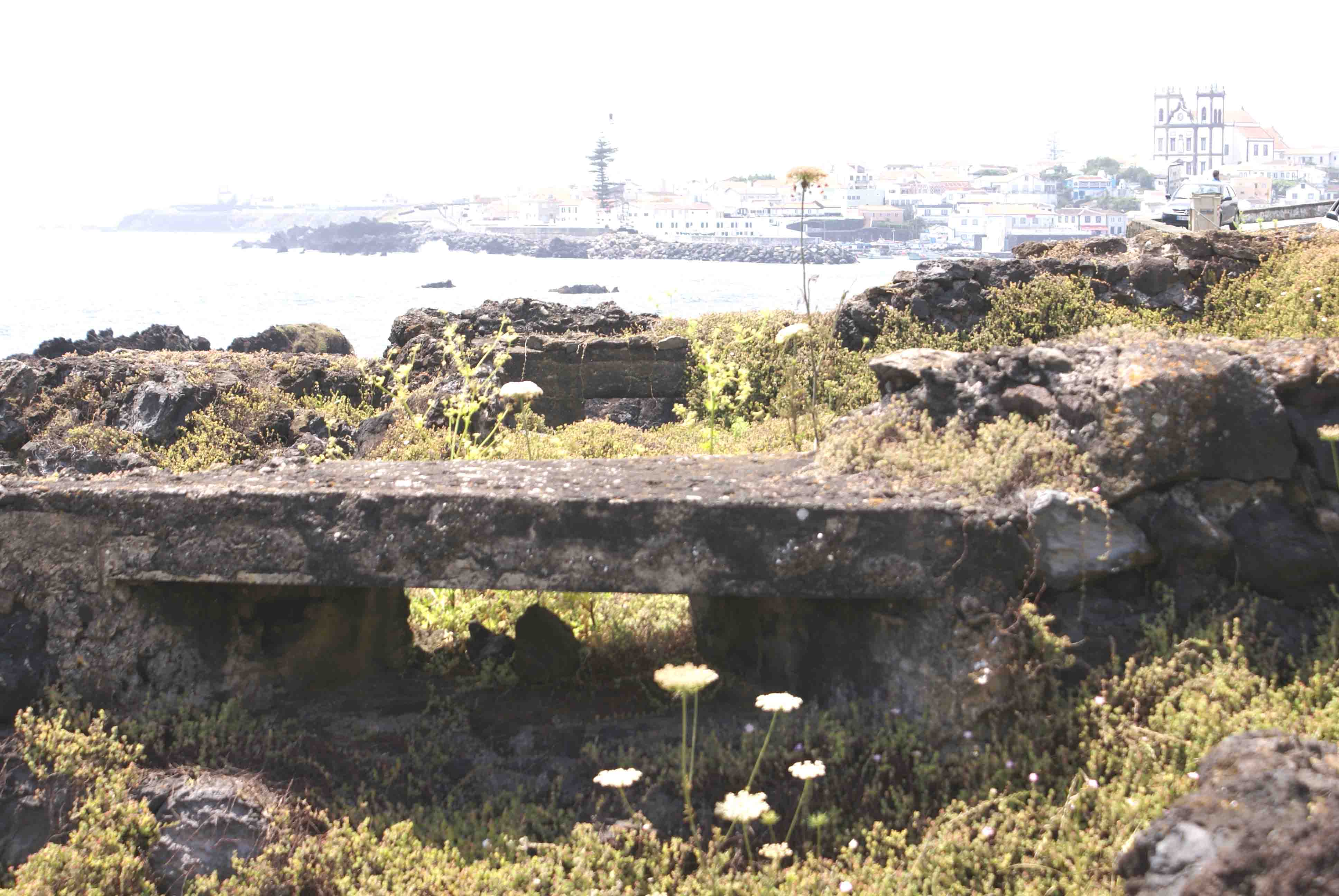 Forte da Má Ferramenta, restos da muralha Este, São Mateus da Calheta, ilha Terceira, Açores, Portugal.